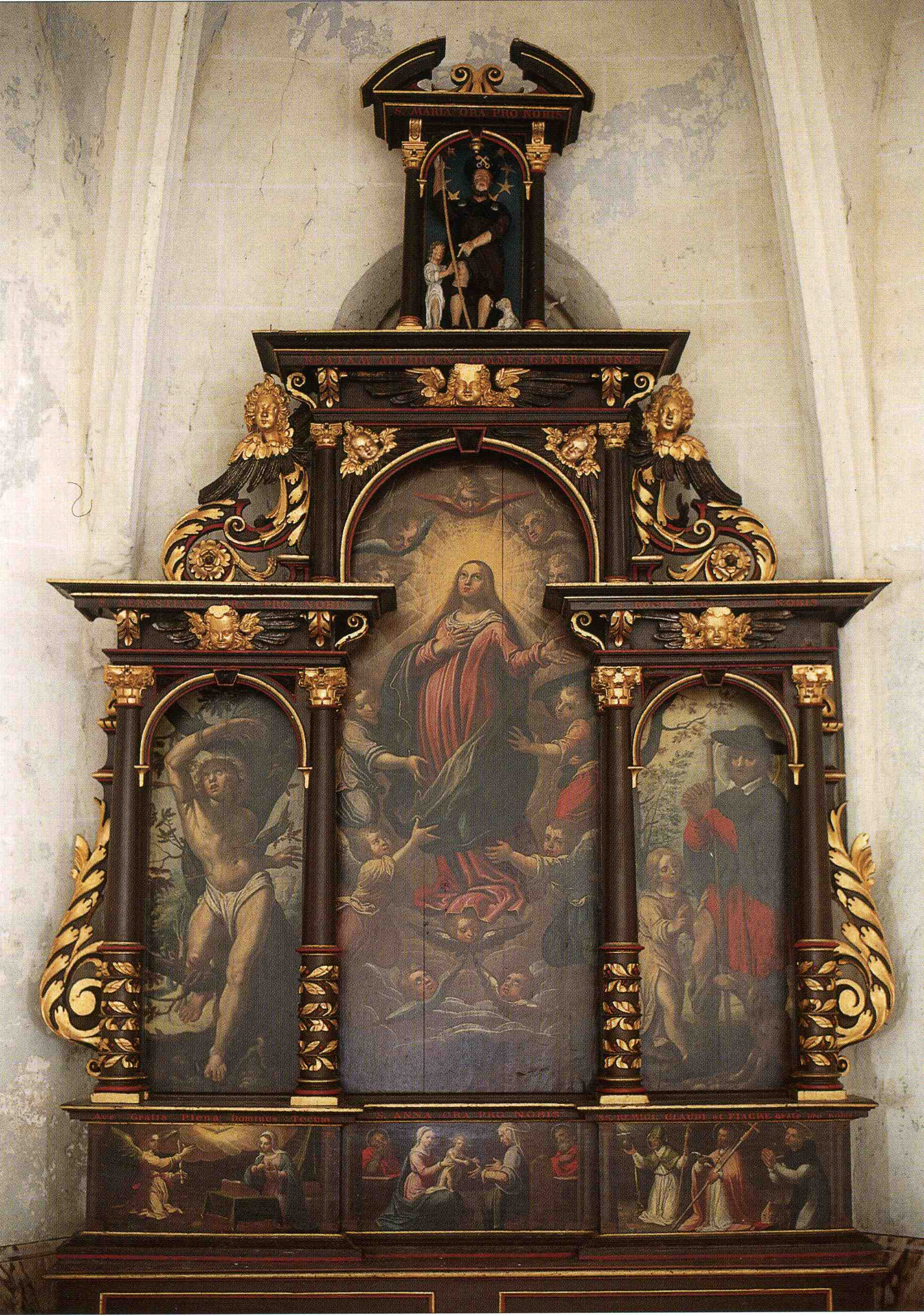 Retable en bois polychrome de Claude Bassot (chapelle Saint-Roch à Saint-Dié-des-Vosges)